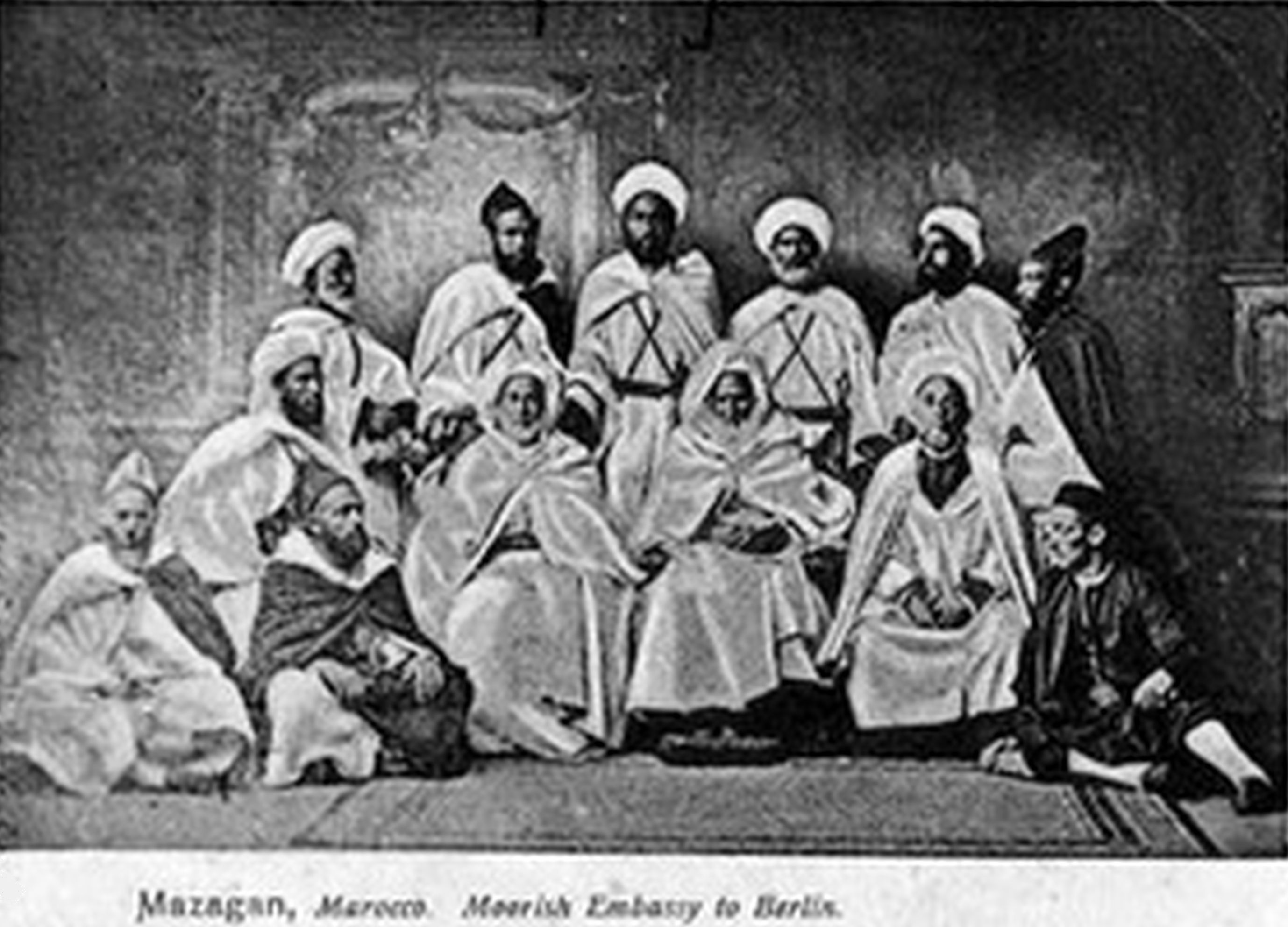 Description : Diplomates marocains pour le départ à Berlin (19e siècle)